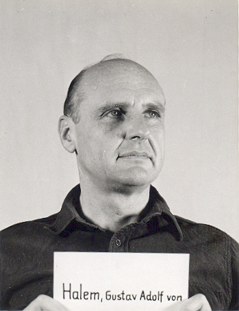 Gustav Adolph von Halem (* 4. November 1899 in Bremen; † 12. Januar 1999 in Rasdorf) war ein deutscher Diplomat und SS-Standartenführer in der Zeit des Nationalsozialismus und Verleger und Filmkaufmann in der Bundesrepublik Deutschland